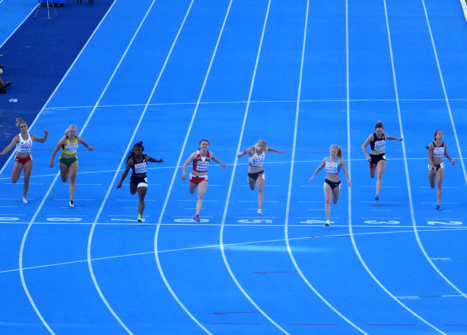 Młodzieżowe Mistrzostwa Europy w Lekkoatletyce U23 w Bydgoszczy 13-16 lipca 2017, półfinał biegu na 100 m kobiet